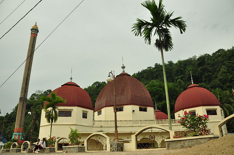 La Grande mosquée de Sawahlunto, Sumatra occidental, Indonésie, construite par les Néerlandais